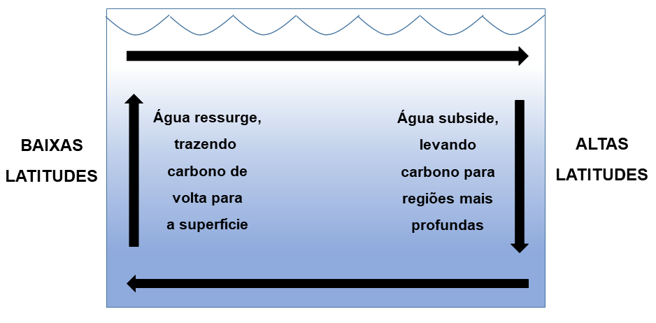 Diagrama esquematizando fluxo de carbono nos oceanos, entre regiões de baixa e alta latitude, e entre a superfície e o fundo oceânico.